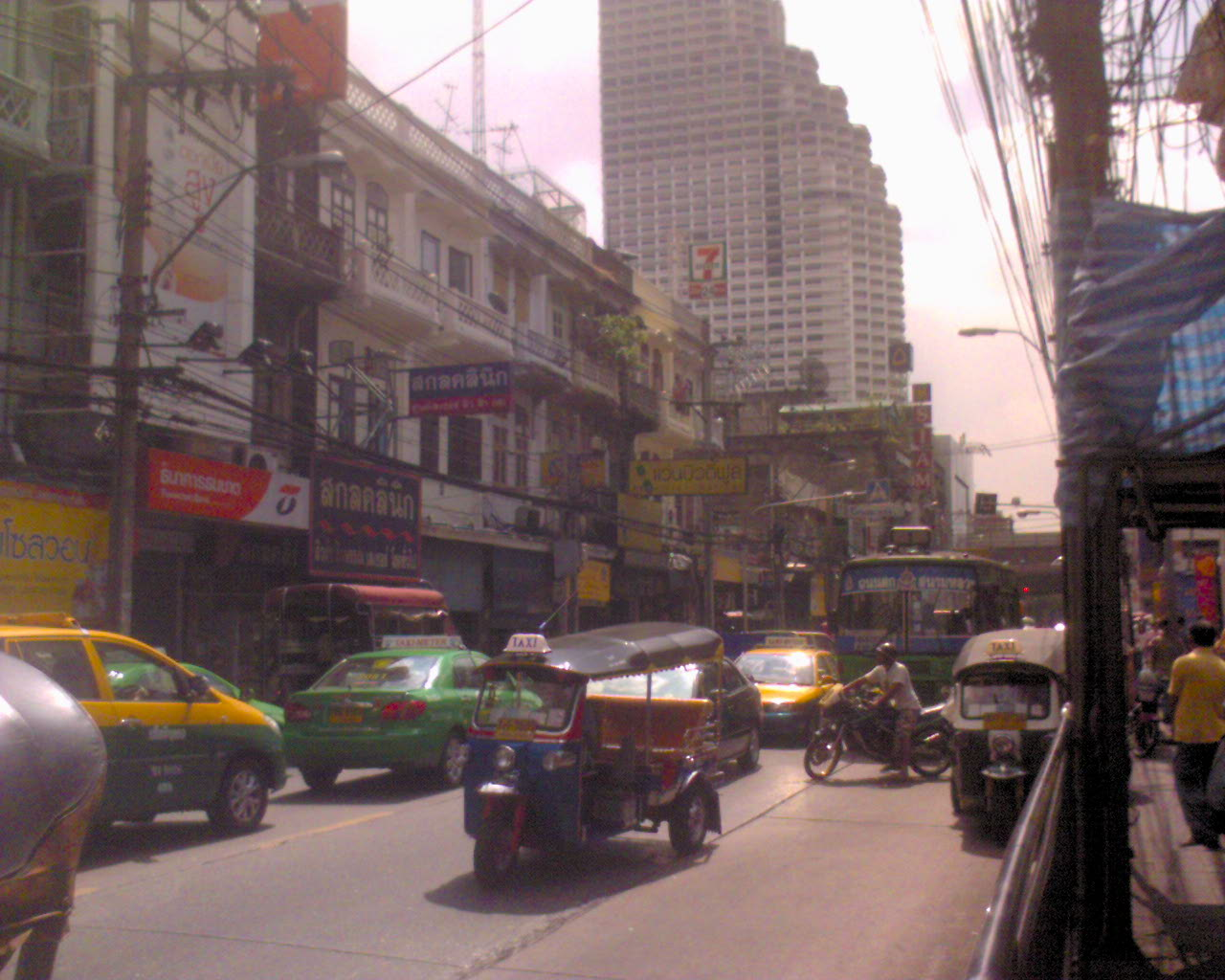 Charoenkrung road (Bangrak)